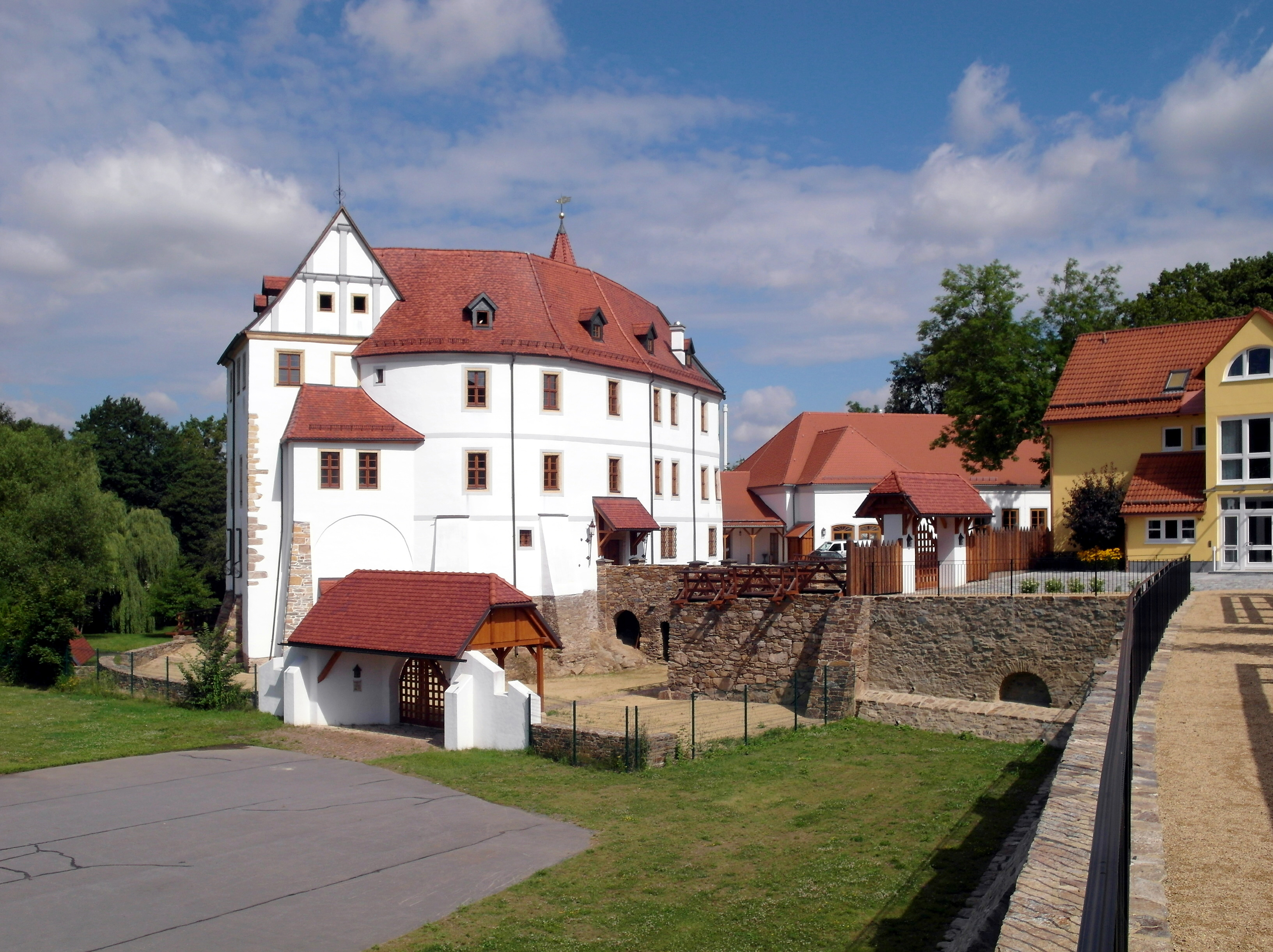 18.07.2016 09600 Weißenborn, Frauensteiner Str. 8 (GMP: 50.872061,13.399188): Schloß, Frauensteiner Straße 8. Sicht von SO. Burg vermutlich aus slawischen Zeit. 1213 erstmals erwähnt. Ab 1365 für 13 Generationen im Besitz der Familie Hartitzsch. Danach viele Besitzerwechsel. Anlage im Wesentlichen spätgotisch, 16. - 17. Jh. mit späteren Umbauten. In der DDR war das Schloß Kulturhaus des VEB Papierfabrik Weißenborn. Arzt-, Bibliotheks- und Wohnräume wurden geschaffen und 1954 der Kulturhaussaal angebaut. Seit 2002 Privatbesitz der Familie Graff Pehrson Vesterager. Umfassend saniert. Nicht mehr öffentlich zugänglich. [SAM6934.JPG]20160718105DR.JPG(c)Blobelt